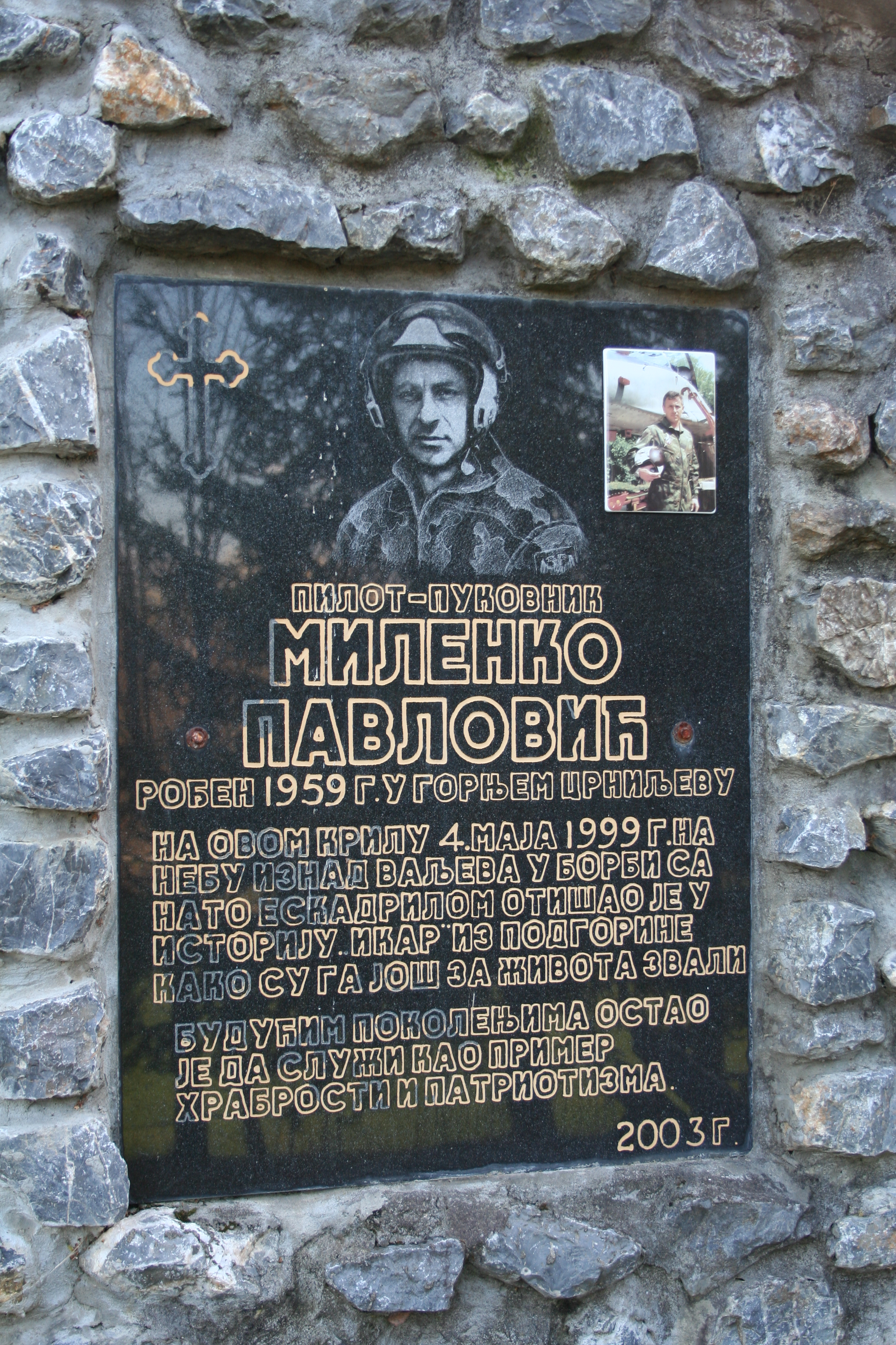 Crkva Sve Georgija i spomen kompleks u Gornjem Crniljevu